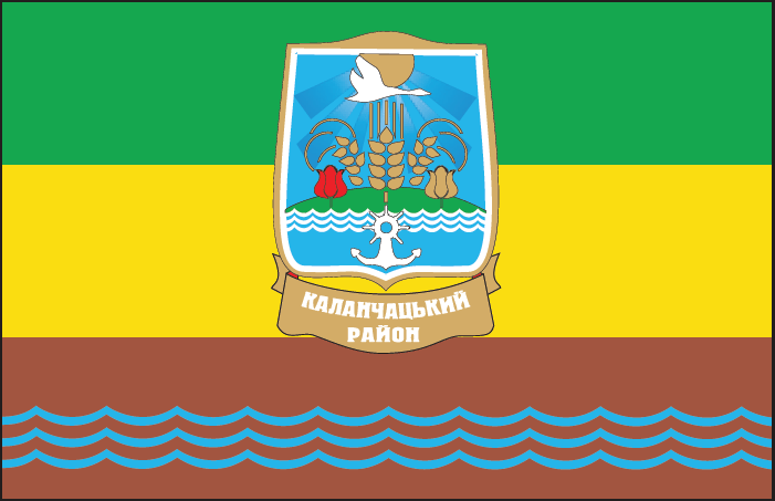 Прапор Каланчацького району